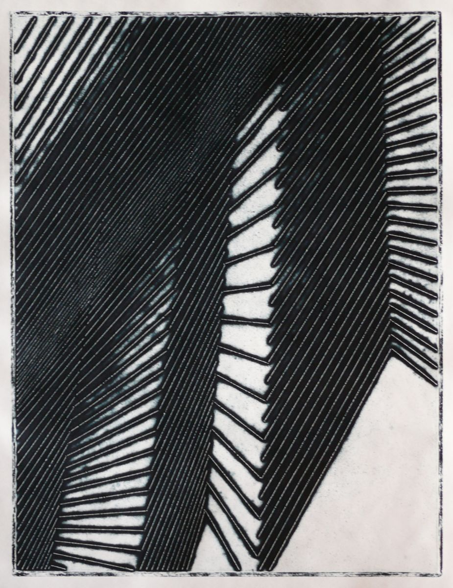 Lubomír Přibyl, LOMENÁ SÍŤ, kolografie 2016